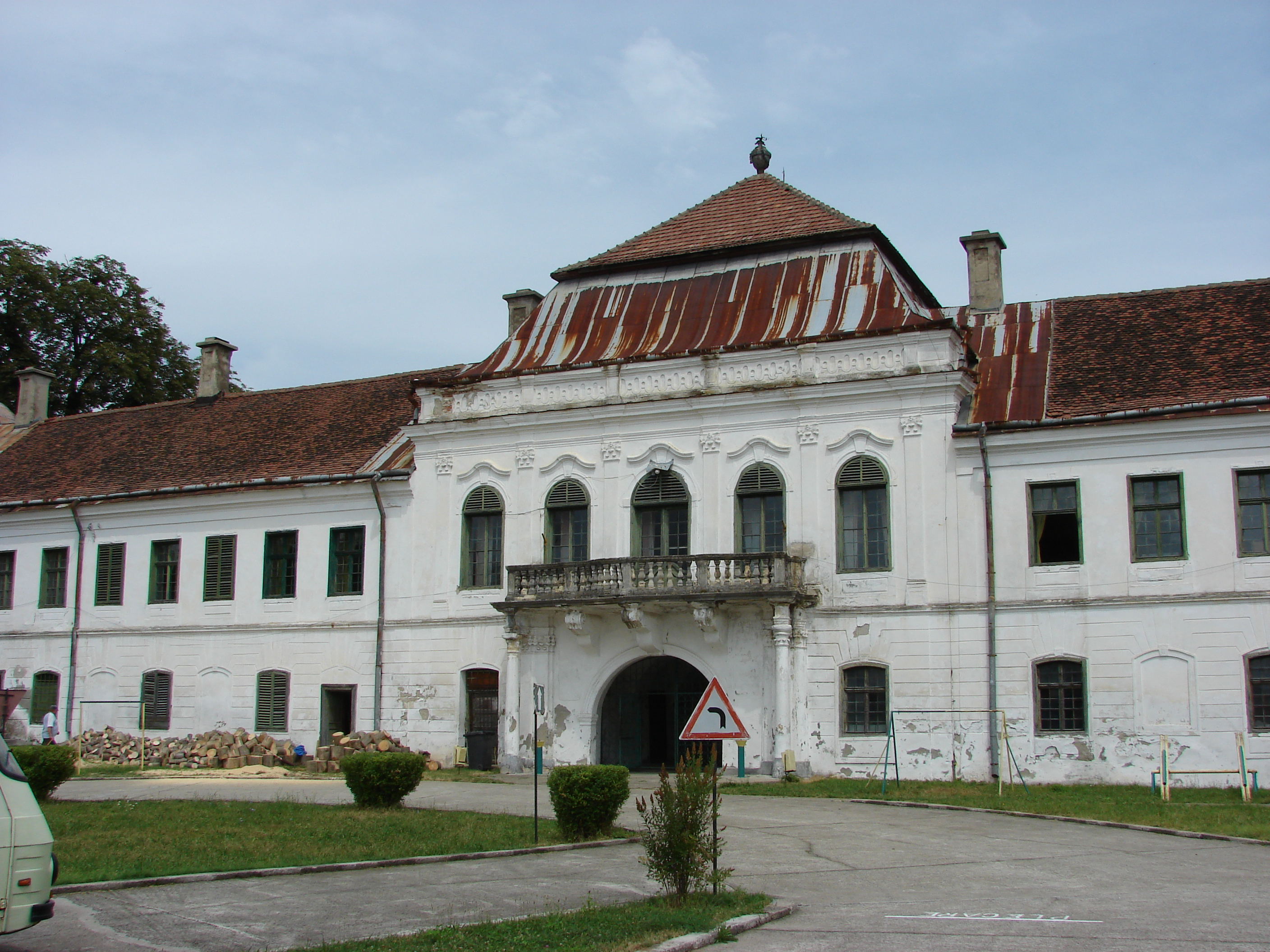 Poza 5